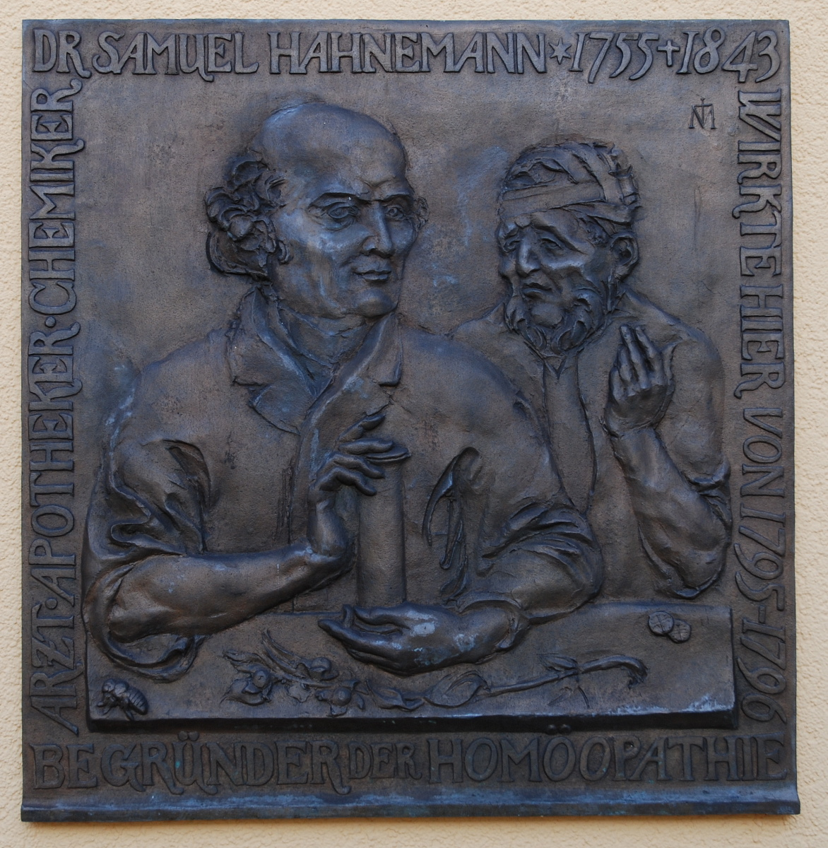 Reliefportrait von Samuel Hahnemann in der Stecherstraße in Braunschweig